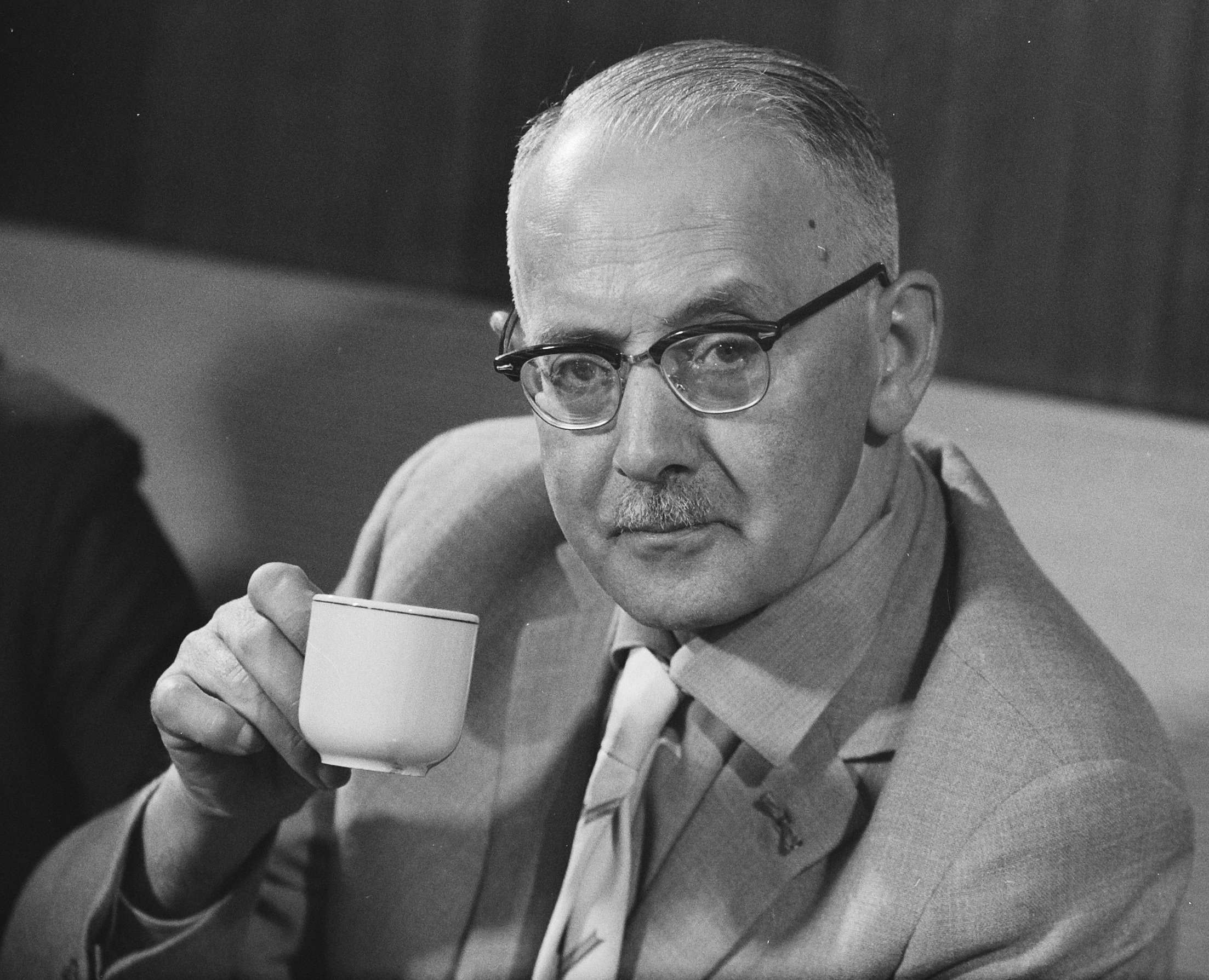 Collectie / Archief : Fotocollectie Anefo Reportage / Serie : [ onbekend ] Beschrijving : Parlementaire commissie terug uit Nieuw-Guinea. Reyers Datum : 13 juni 1961 Locatie : Nieuw-Guinea Trefwoorden : commissies Fotograaf : Nijs, Jac. de / Anefo Auteursrechthebbende : Nationaal Archief Materiaalsoort : Negatief (zwart/wit) Nummer archiefinventaris : bekijk toegang 2.24.01.03 Bestanddeelnummer : 912-5970